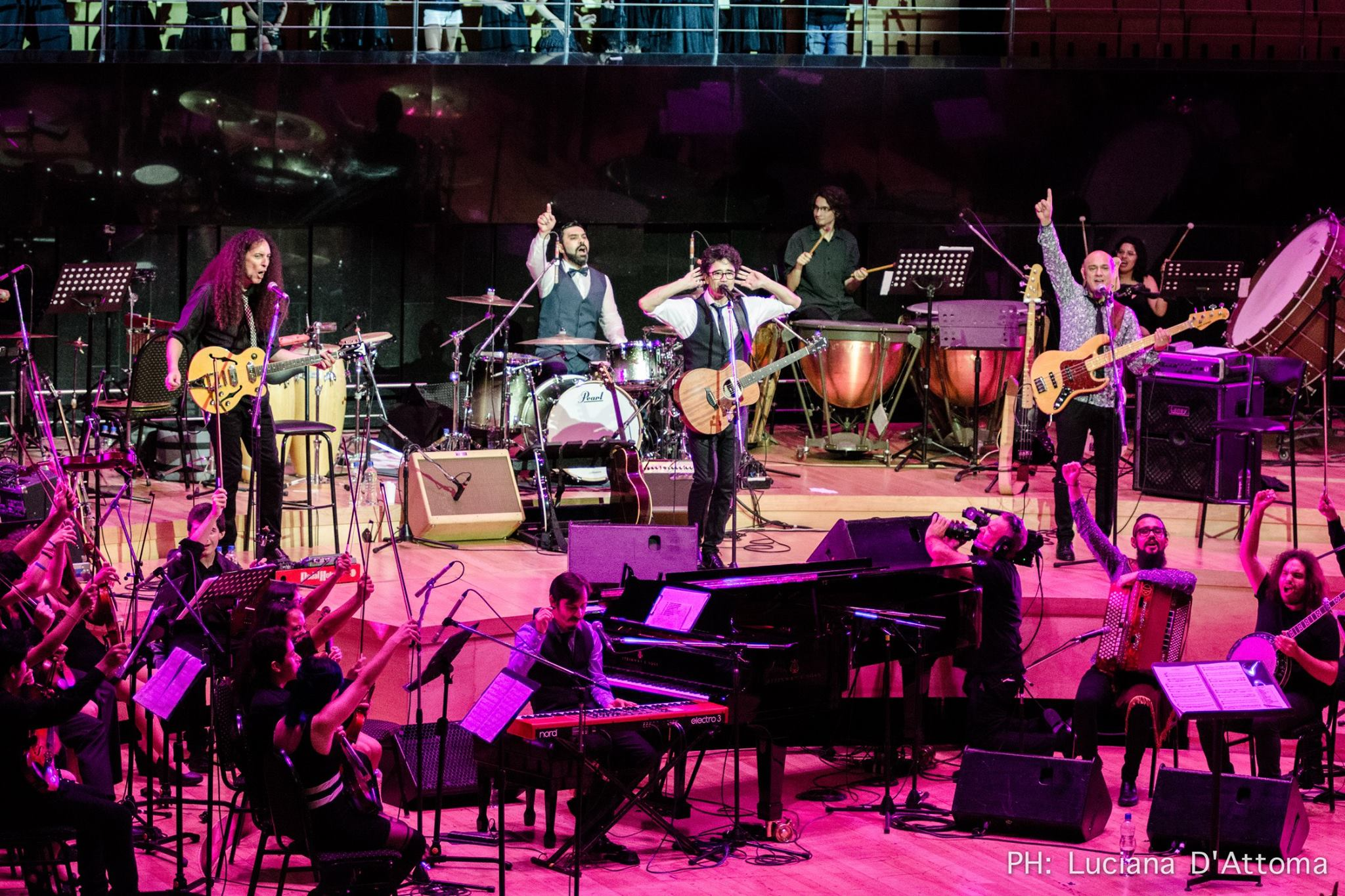 Rescate presentación sinfónica en Centro cultural Kirchner.